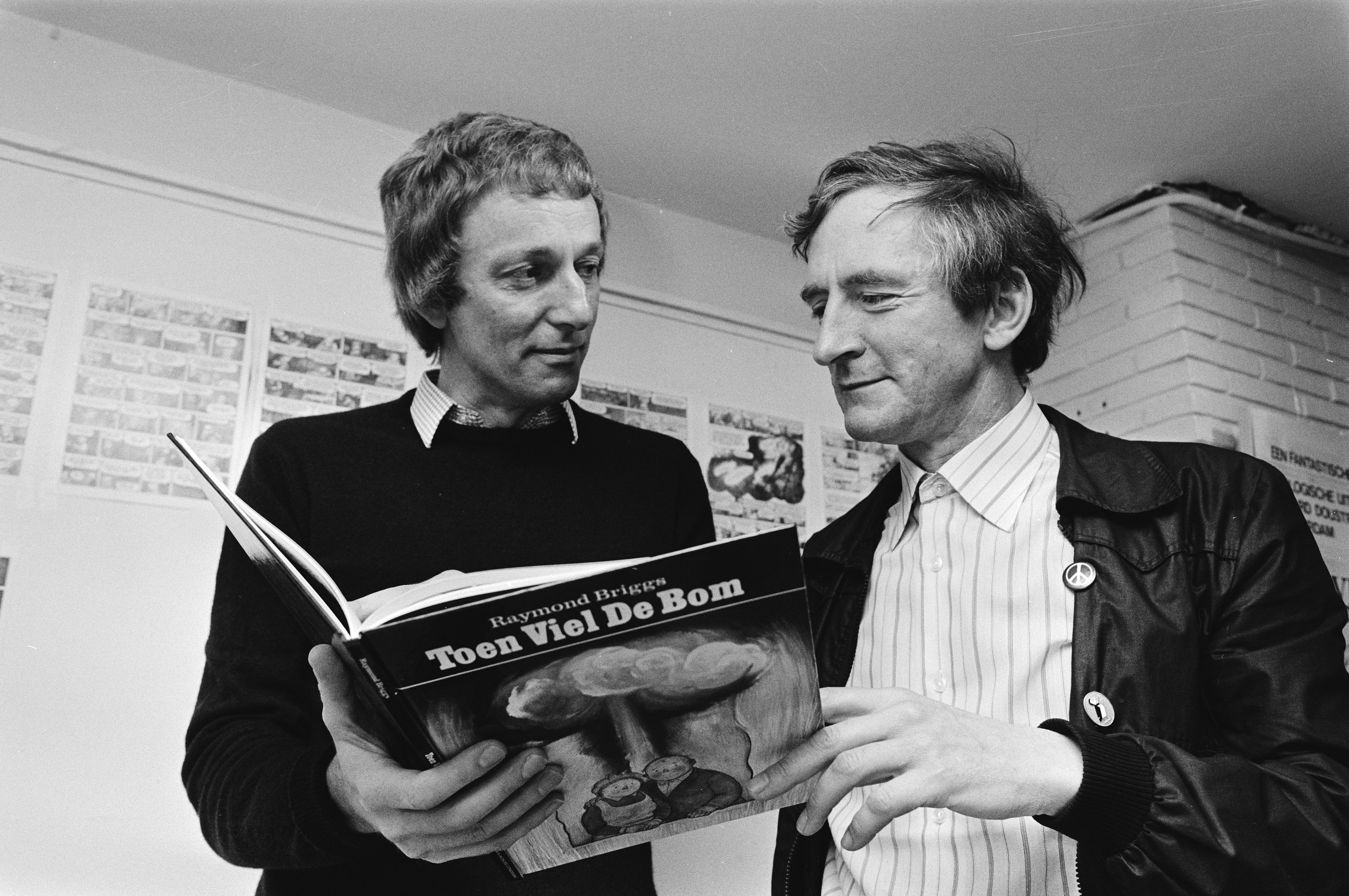 Collectie / Archief : Fotocollectie Anefo Reportage / Serie : IKV-secretaris Mient Jan Faber (l) ontvangt het eerste exemplaar van het stripboek "Toen viel de bom" van schrijver Raymond Briggs Beschrijving : strips, schrijvers, kernwapens, Briggs, Raymond Datum : 10 mei 1983 Trefwoorden : kernwapens, schrijvers, strips Persoonsnaam : Briggs, Raymond; Faber, Mient Jan Fotograaf : Croes, Rob C. / Anefo Auteursrechthebbende : Nationaal Archief Materiaalsoort : Negatief (zwart/wit) Nummer archiefinventaris : bekijk toegang 2.24.01.05 Bestanddeelnummer : 932-5852